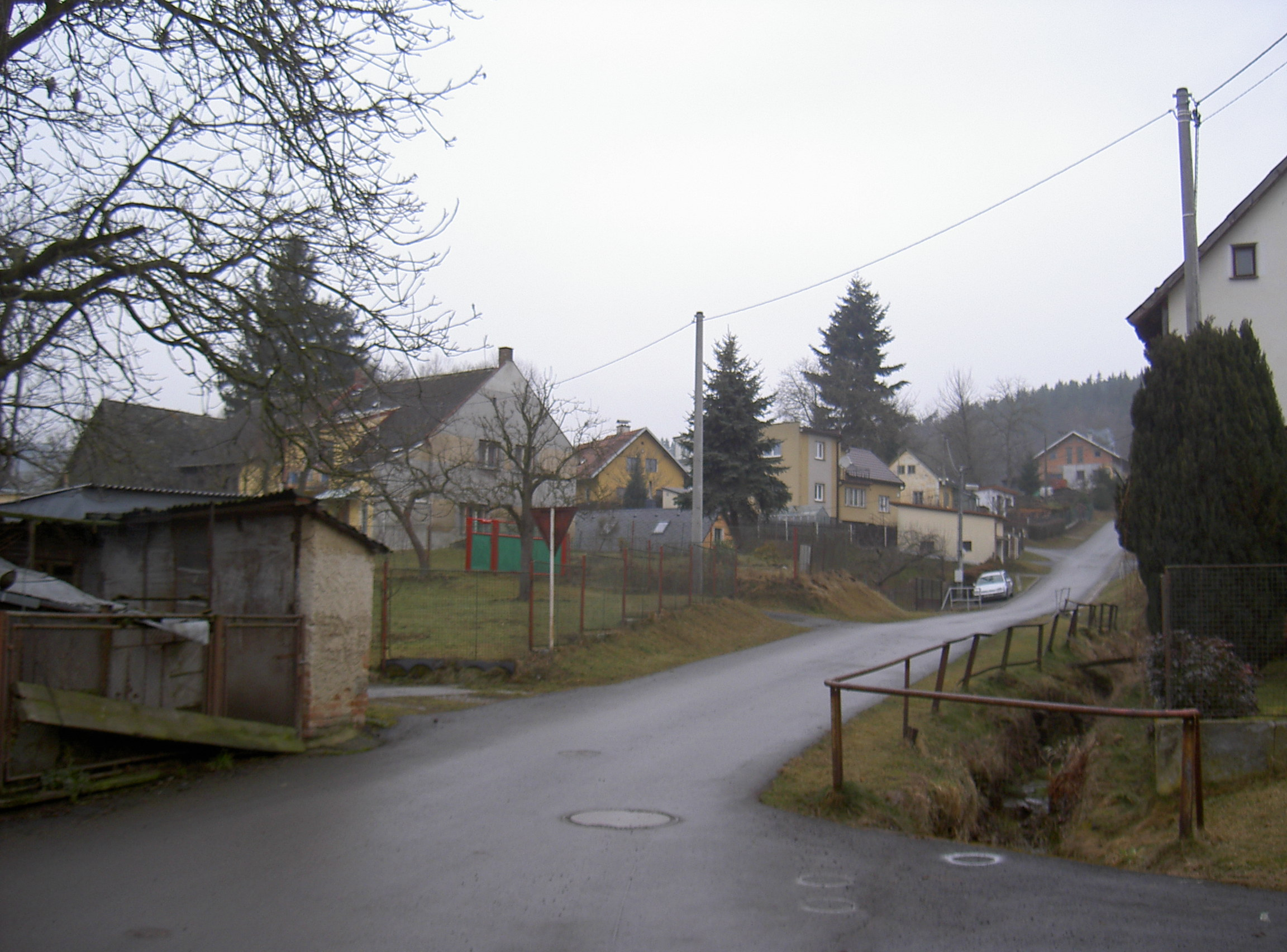 Mlynec (deutsch: Linz) bei Postřekov